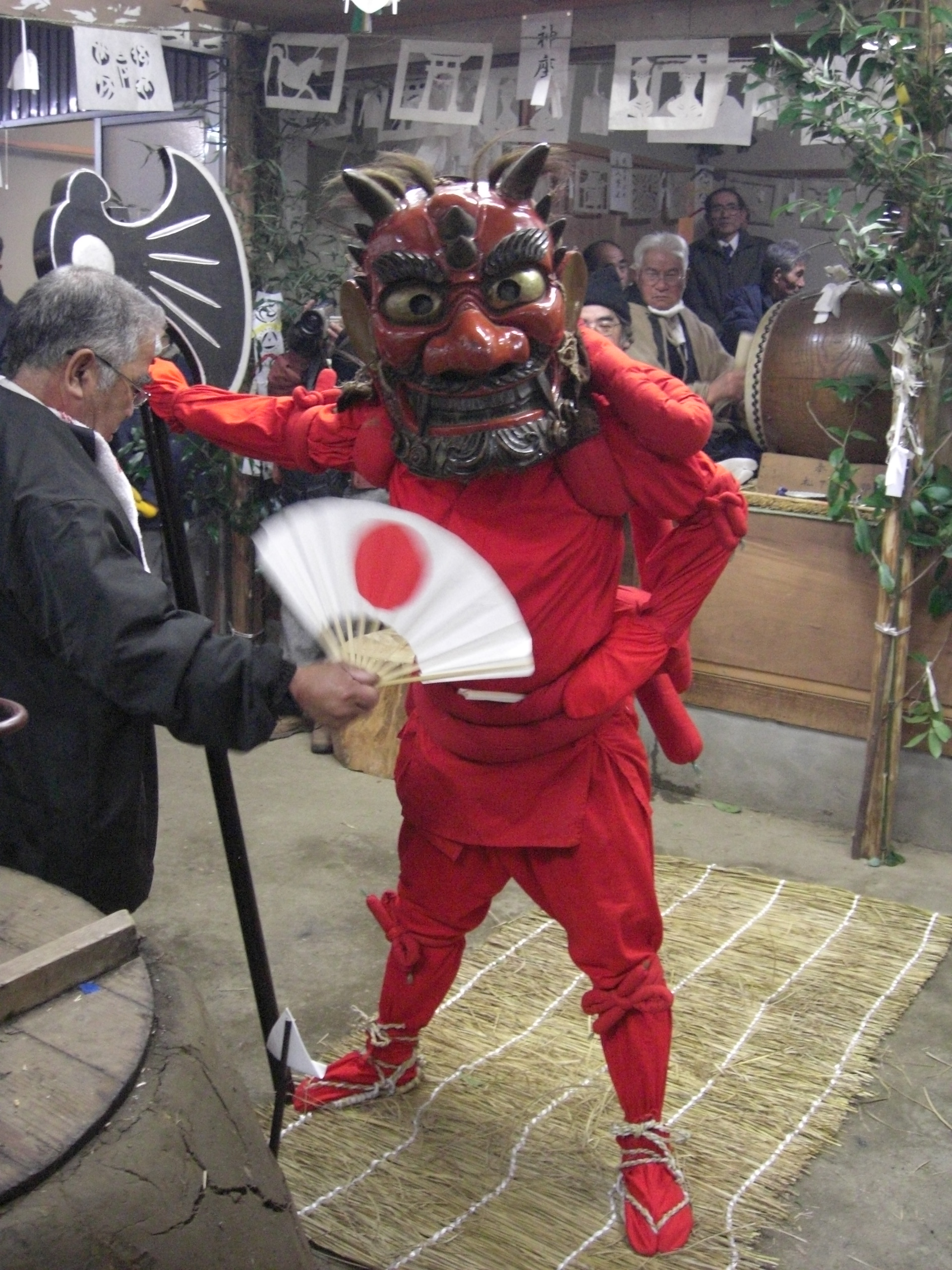 愛知県北設楽郡東栄町古戸で行われている花祭（霜月神楽）。「榊鬼」。